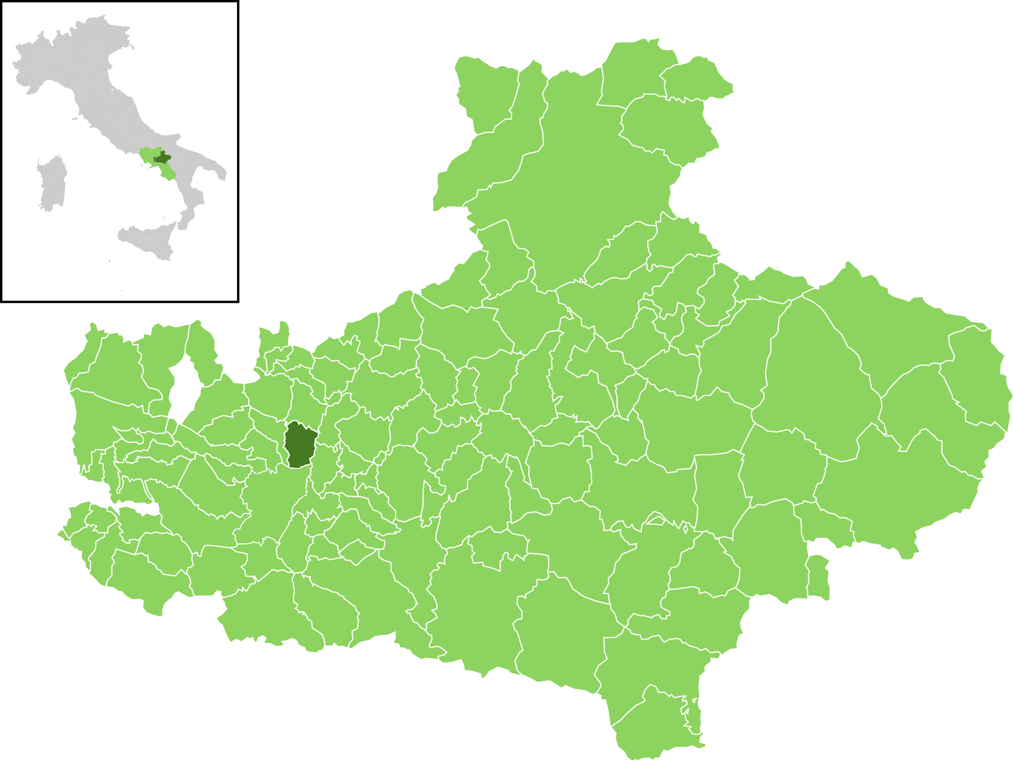 Posizione del comune all'interno della provincia di Avellino